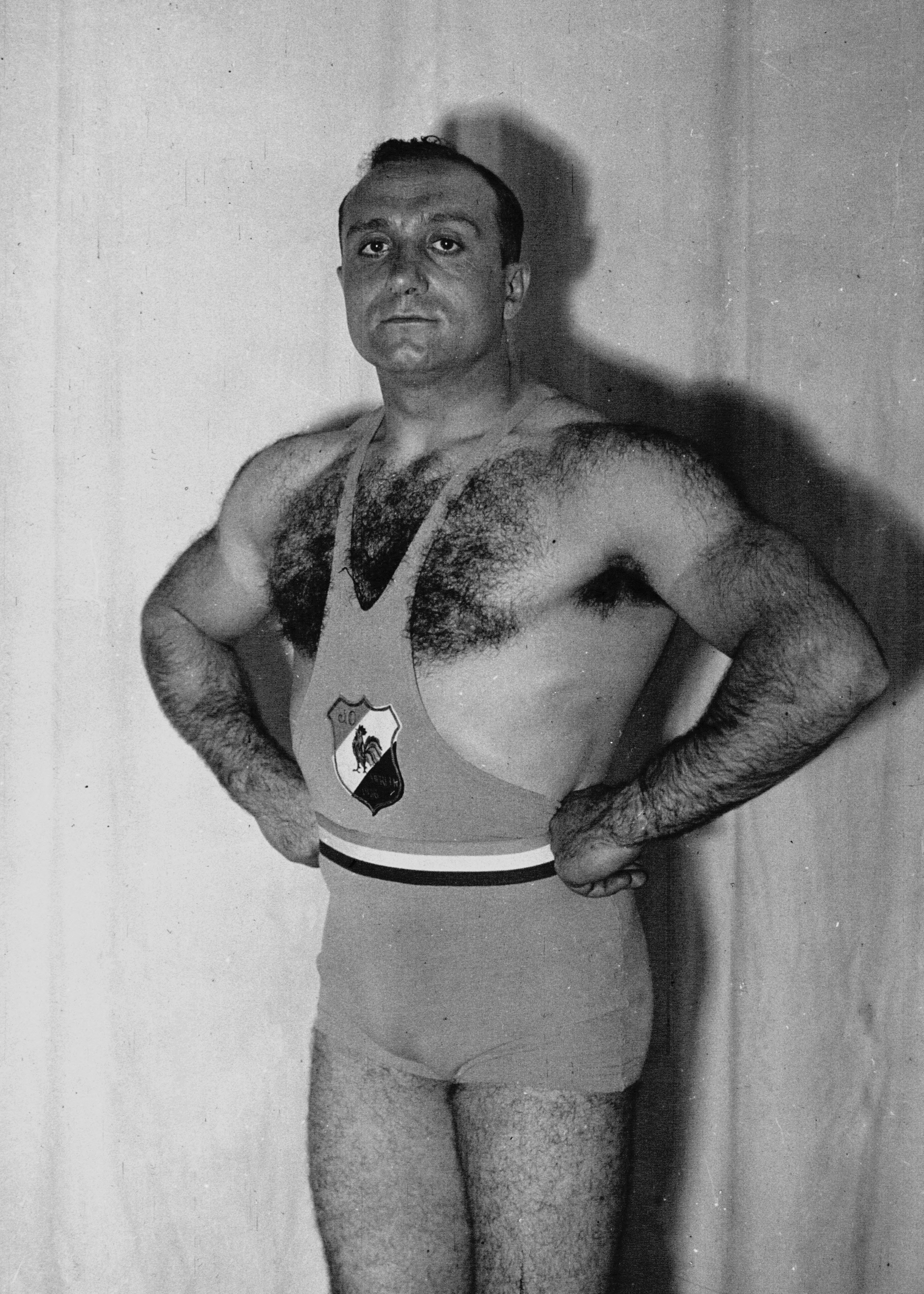 Portrait de Hostin, champion olympique de poids et haltères, français : [photographie de presse] / Agence Meurisse.